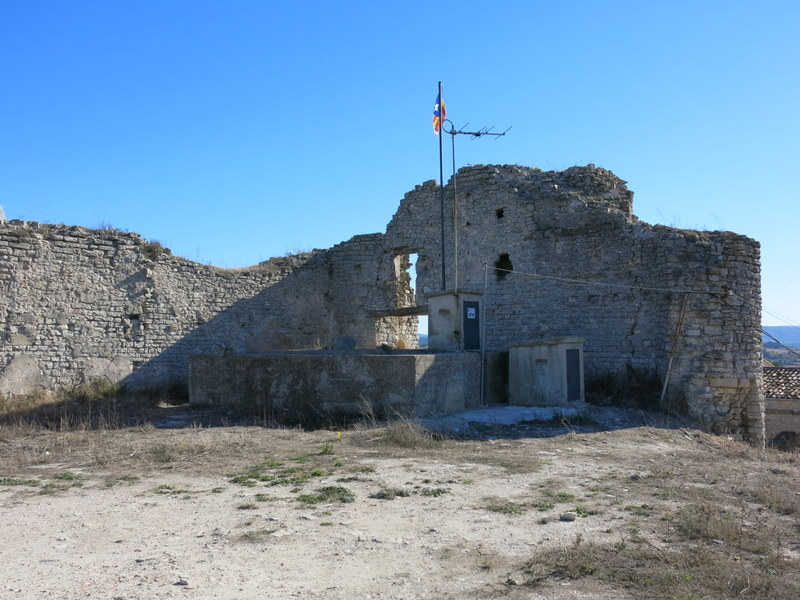 Castell d'Aguiló - Sta. Coloma de Queralt